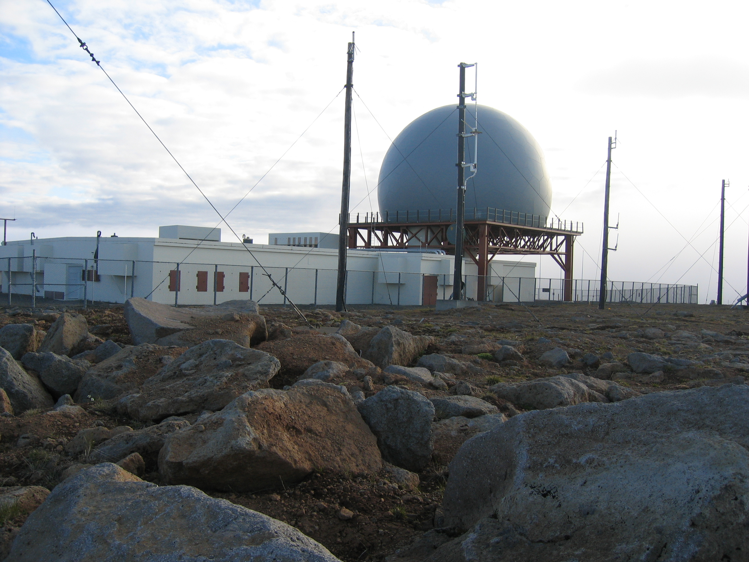 Bolungarvík, Bolafjalla Iceland Salvör Gissurardóttir Julý 2006